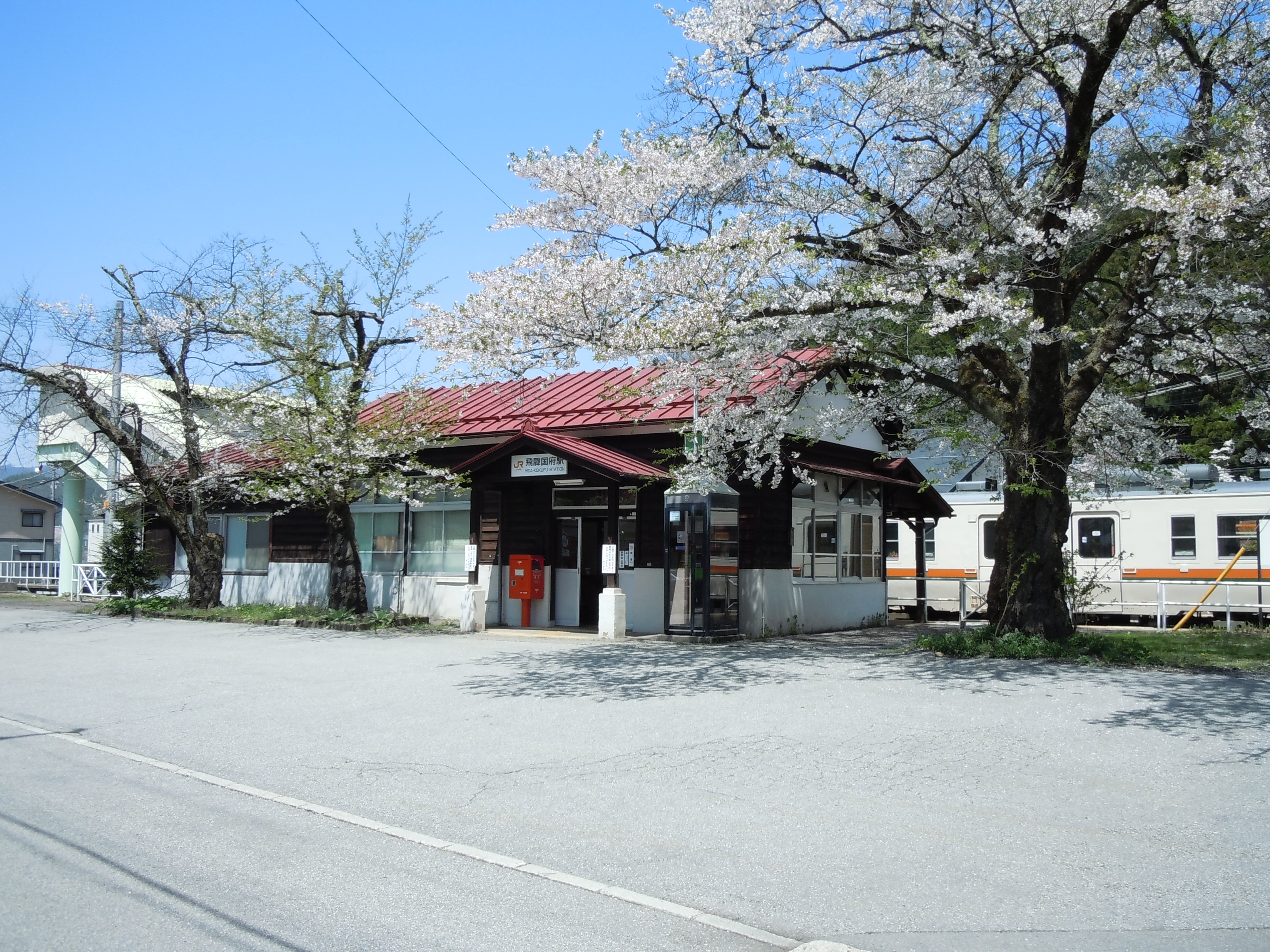 飛騨国府駅駅舎 岐阜県高山市国府町